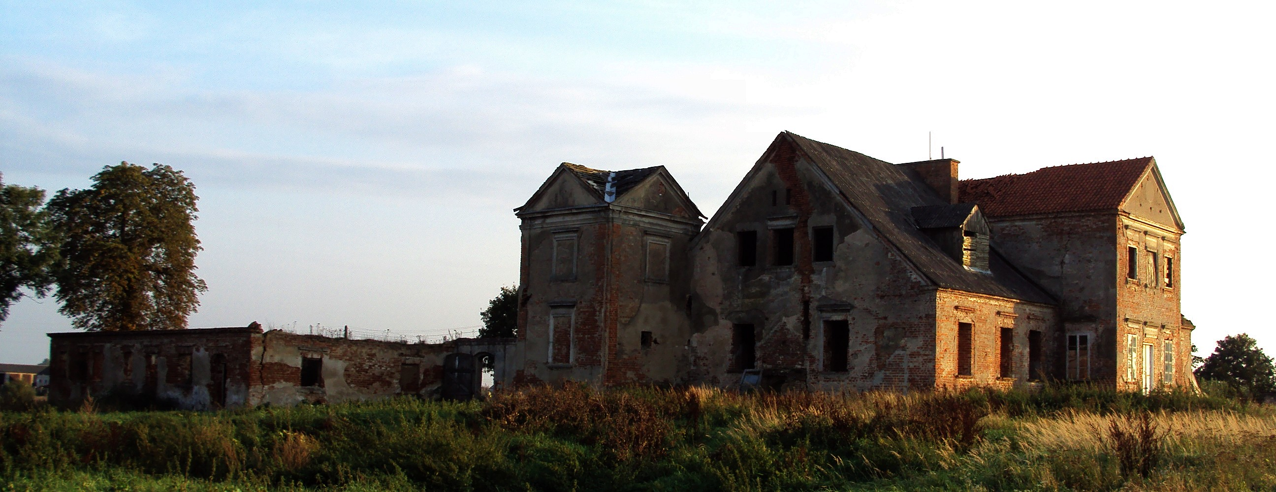 Radziki Małe, pałac, k. XVIII; 2 oficyny, XVII-XIX